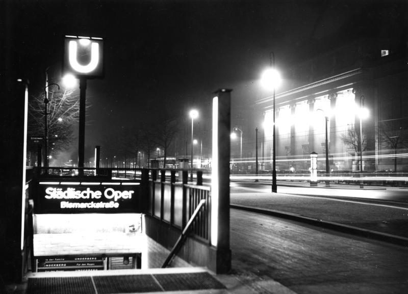 Berlin - Charlottenburg Städtische Oper (rechts) vor der Zerstörung links: Untergrundbahnhof